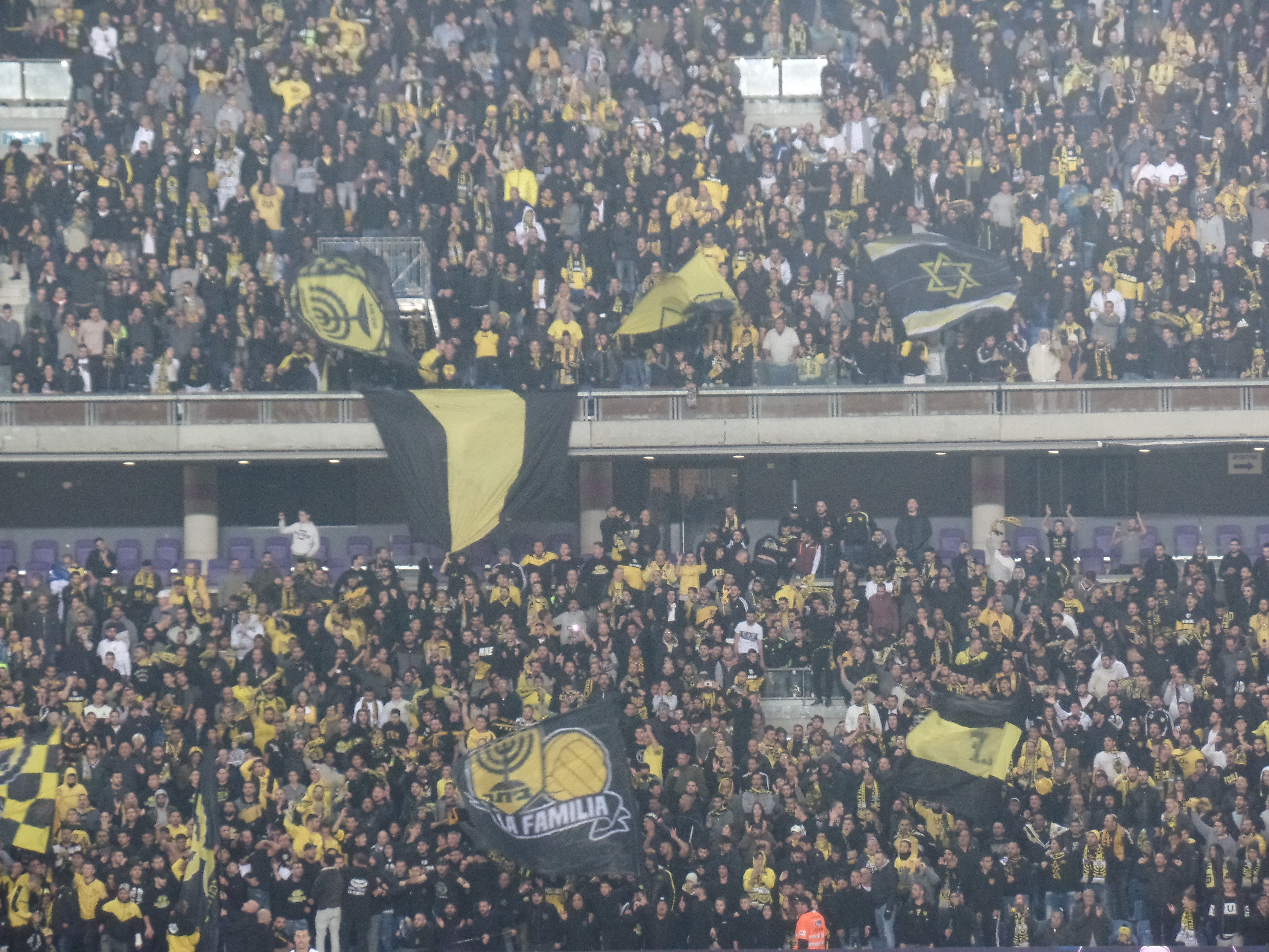 יציע אוהביד בית"ר ירושלים 2018